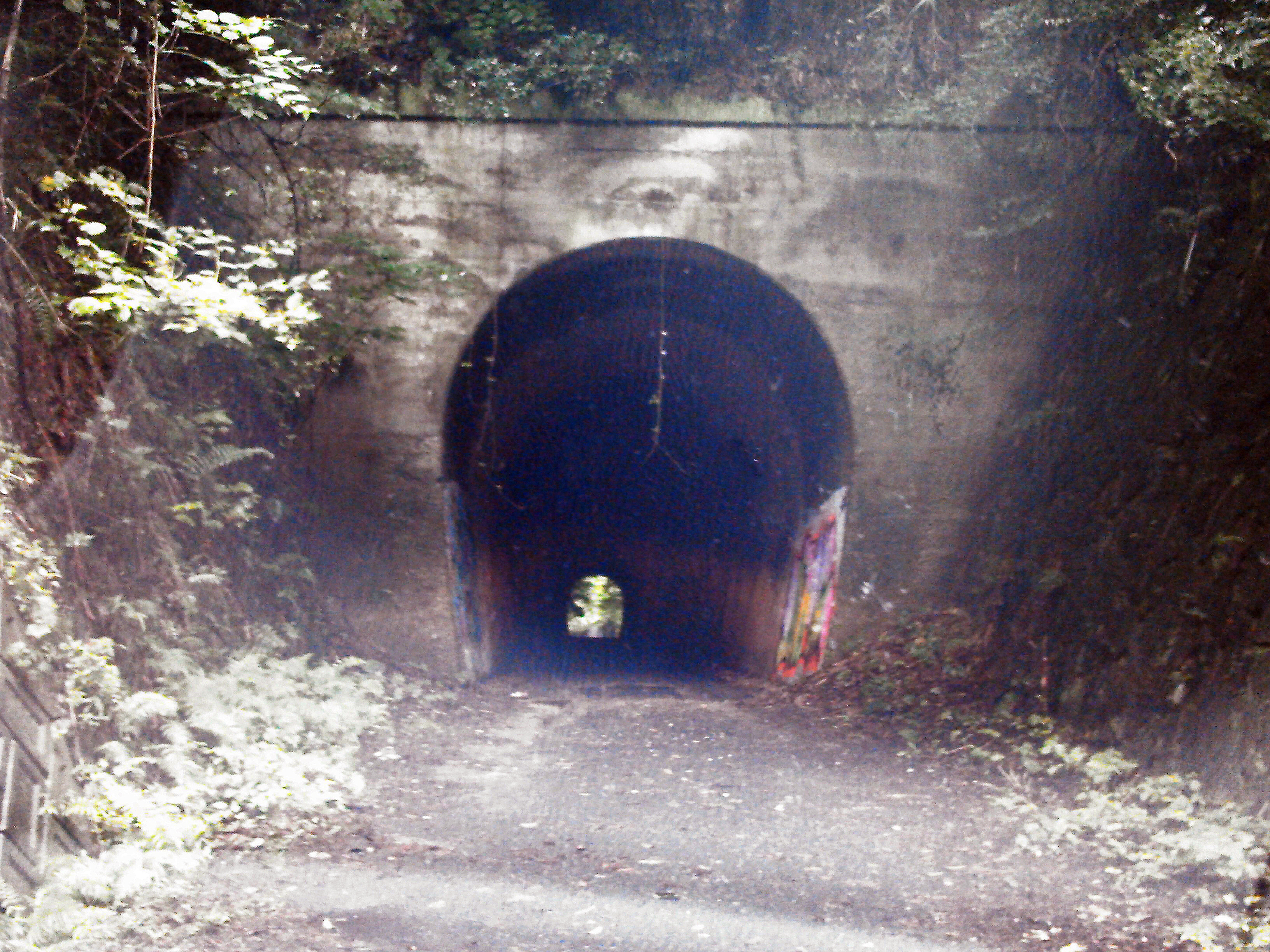 香川県木田郡三木町、立石隧道。投稿者本人により三木町側より撮影。